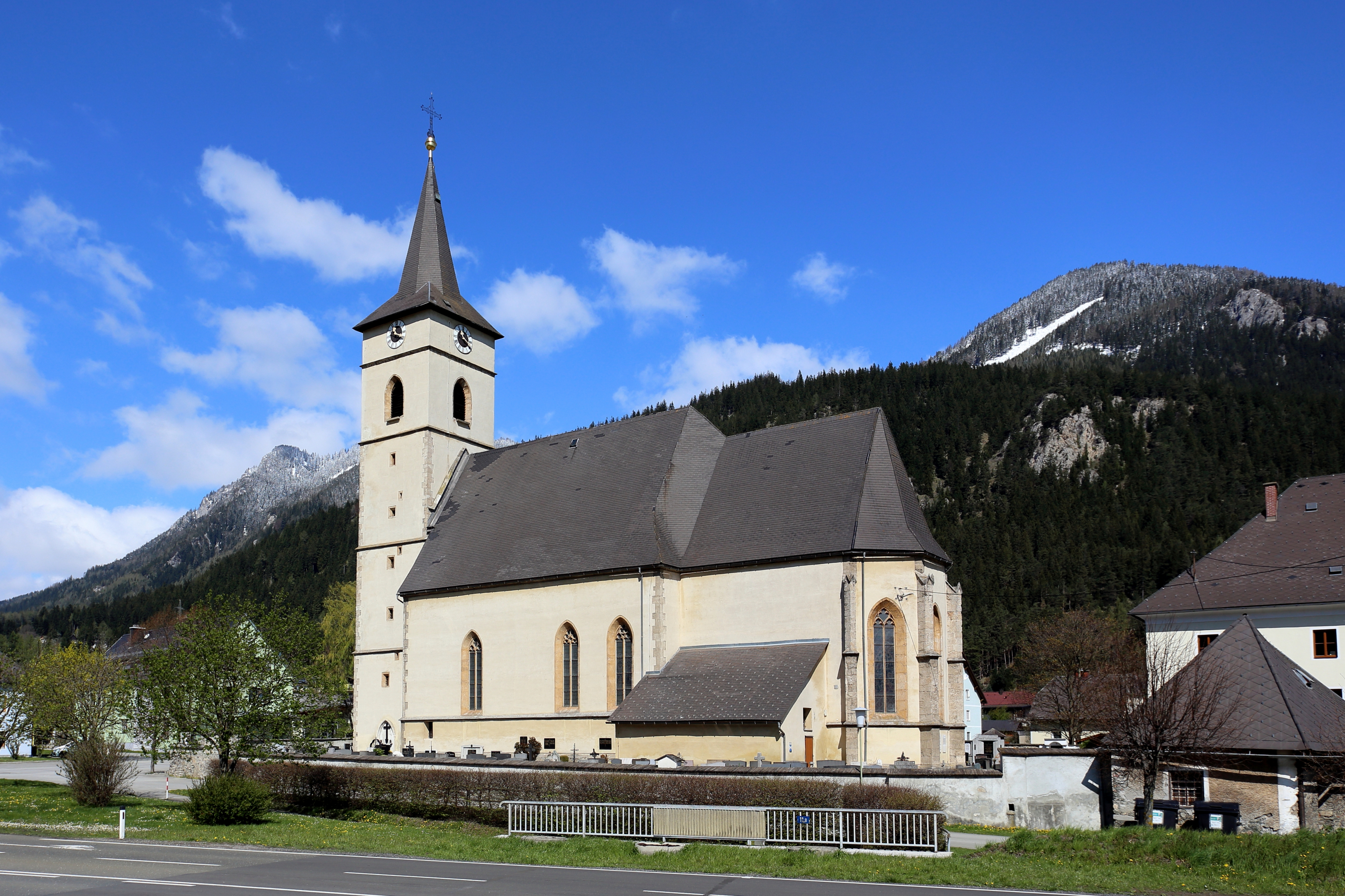 Südostansicht der Pfarrkirche hl. Johannes der Täufer in der steiermärkischen Marktgemeinde Kammern im Liesingtal. Die spätgotische Kirche befindet sich am südlichen Ortsrand und ist von einem teilweise ummauerten Friedhof umgeben. Im Sommer 1480 wurde die Vorgängerkirche bei einem Türkeneinfall zerstört. Danach wurde der Sakralbau wieder aufgebaut, erweitert und 1510 geweiht. Der achteckige Turmhelm des quadratischen, vorgestellten Westturmes stammt aus dem Ende des 19. Jahrhunderts. In der südlich angebauten Sakristei, die teilweise ein Teil des romanischen Vorgängerbaues ist, befinden sich am Tonnengewölbe noch schlecht erhaltene Fresken aus dem 13. Jahrhundert. Zur Barockzeit wurde nördlich eine kleine Kapelle angebaut.